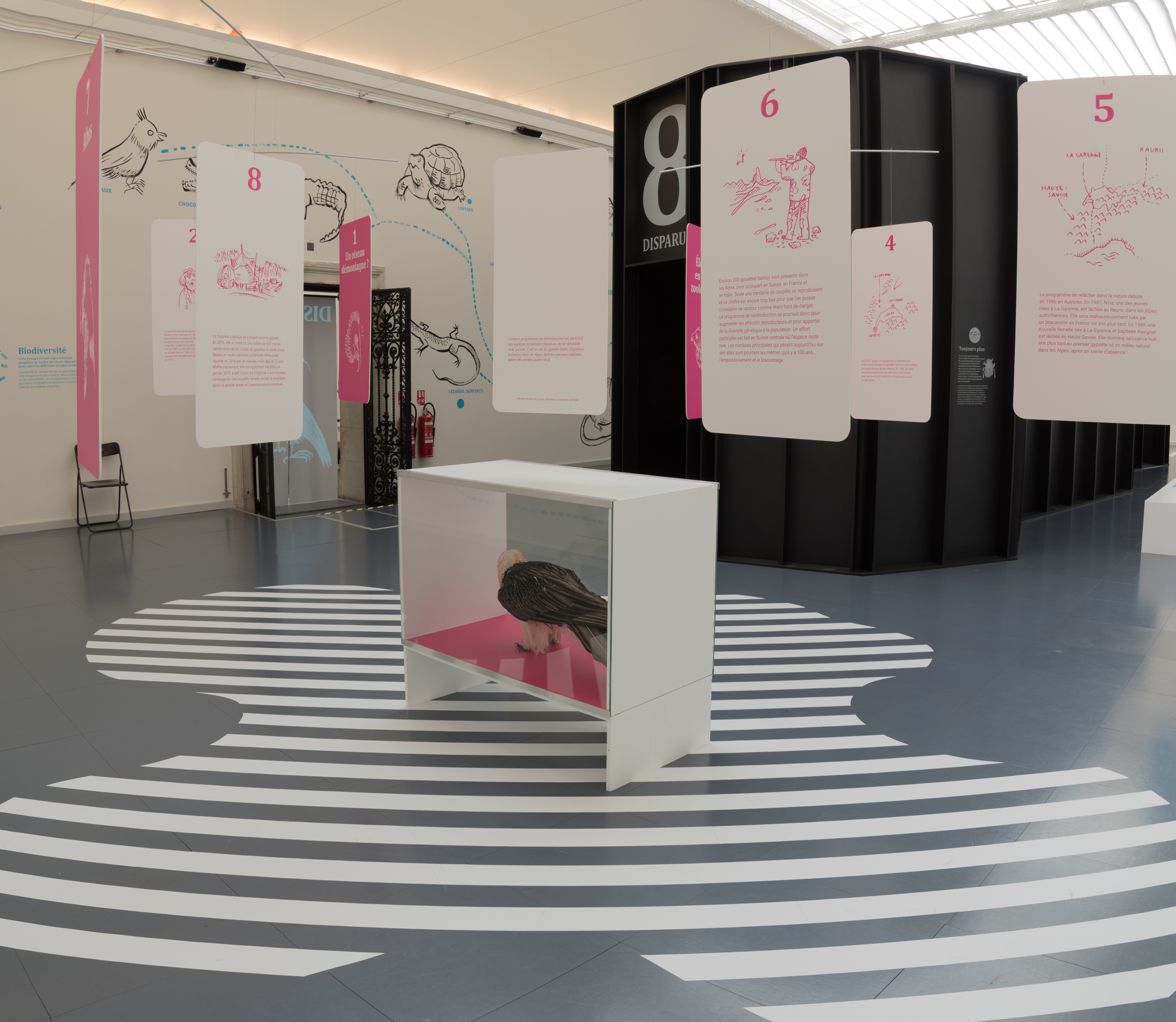 Photographie panoramique de l'exposition Disparus